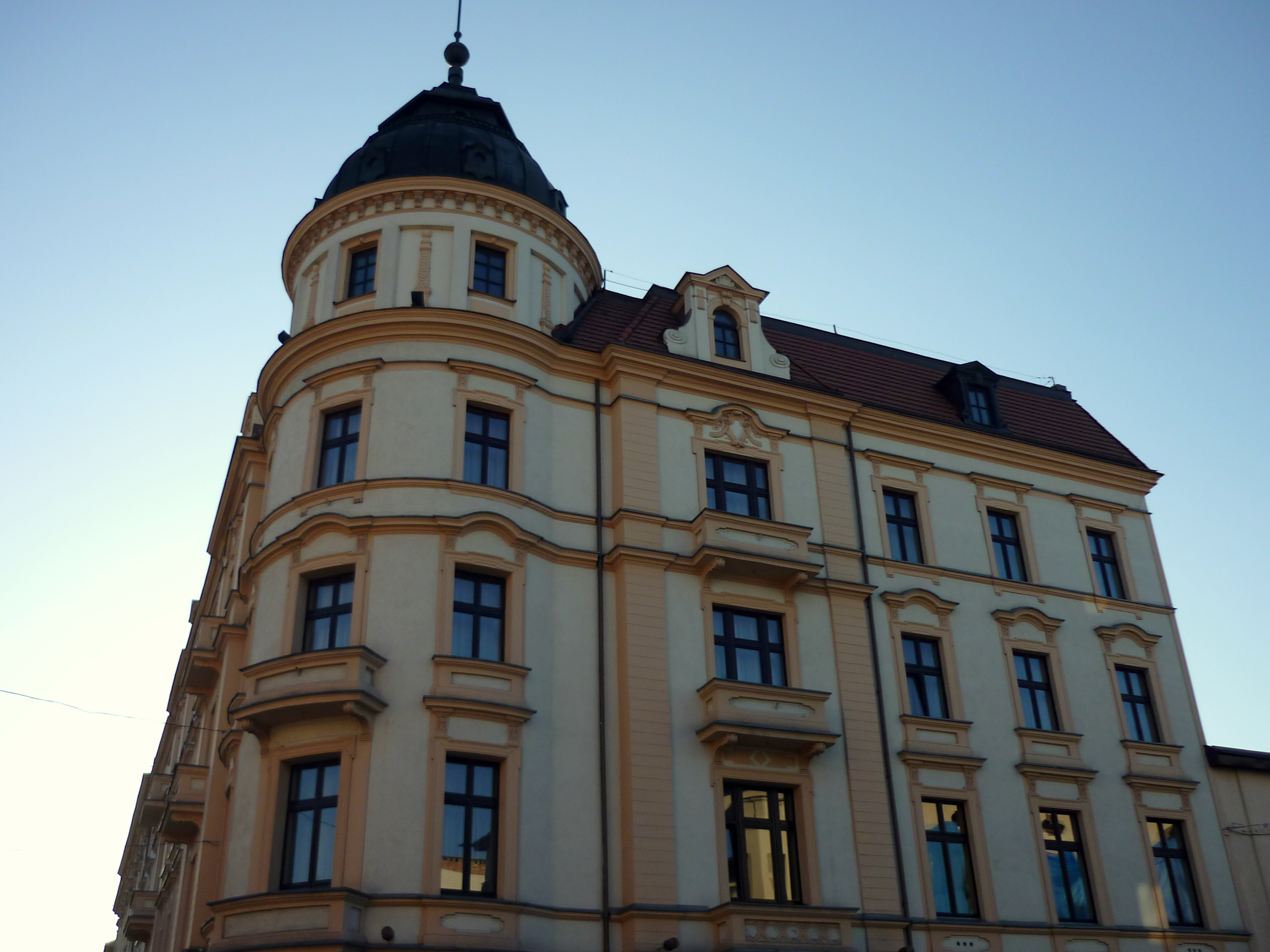 Hotel "Bast" w Inowrocławiu